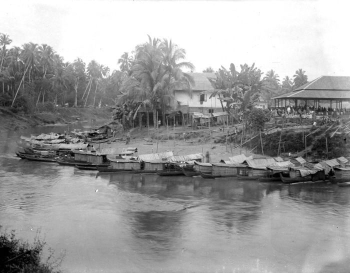 Repronegatief. Negara, het marktvolk heeft zijn prauwen gemeerd